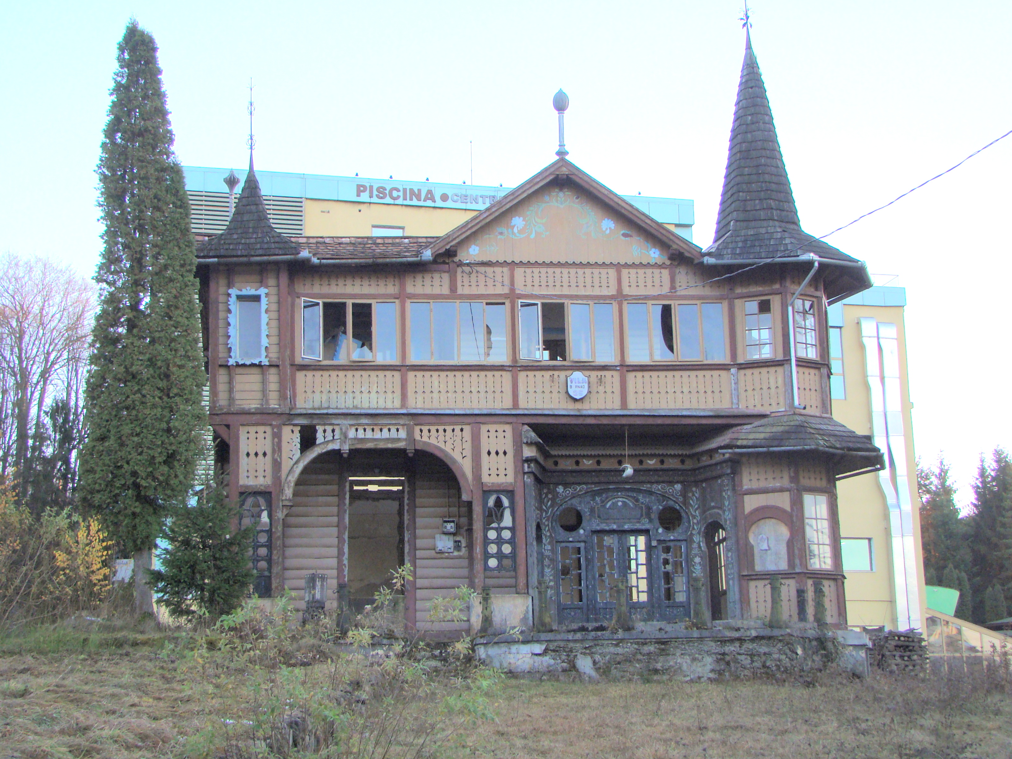 Casa Bernady oraș Sovata Str. Trandafirilor 133